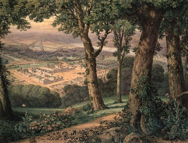 Laurent Pelletier Aquarell Das erträumte Phalanstère von Charles Fourier